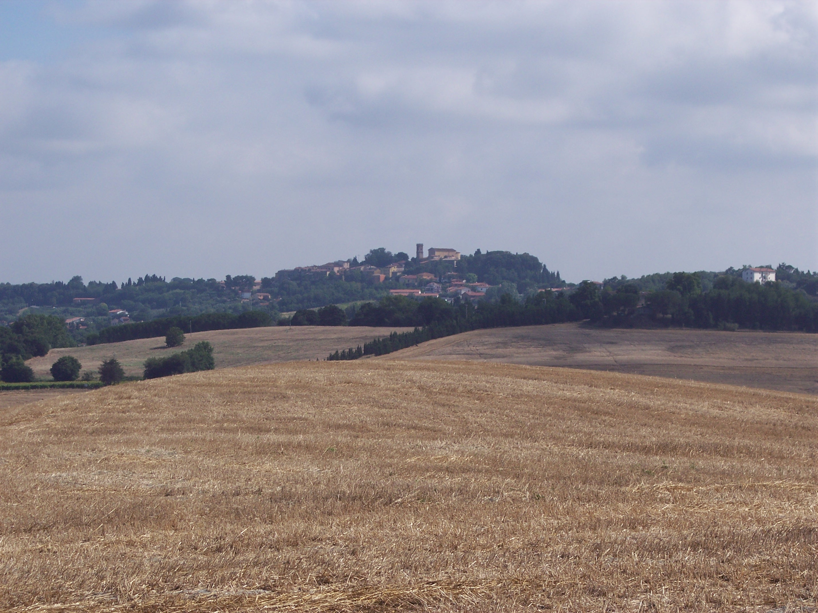 veduta di Lorenzana (Pi)